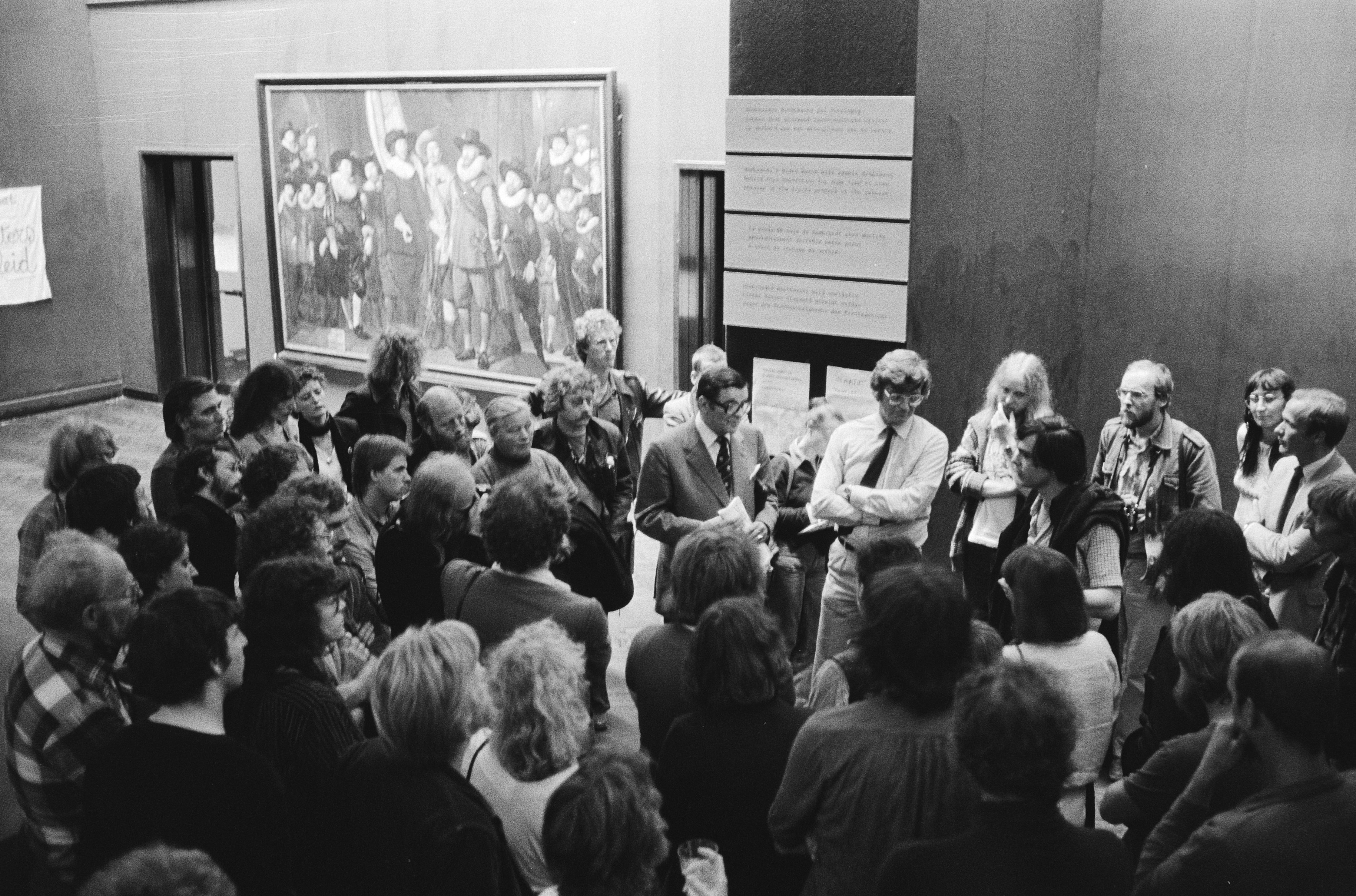 Collectie / Archief : Fotocollectie Anefo Reportage / Serie : Kunstenaars bezetten de Rembrandtzaal van het Rijksmuseum uit protest tegen het beleid van het Ministerie van CRM inzake de BKR (Beeldende Kunstenaars Regeling) Beschrijving : Kunstenaars met CRM vertegenwoordigers Datum : 22 juni 1979 Locatie : Amsterdam, Noord-Holland Trefwoorden : acties, betogingen, kunstenaars, musea Instellingsnaam : Rijksmuseum Fotograaf : Suyk, Koen / Anefo Auteursrechthebbende : Nationaal Archief Materiaalsoort : Negatief (zwart/wit) Nummer archiefinventaris : bekijk toegang 2.24.01.05 Bestanddeelnummer : 930-3278